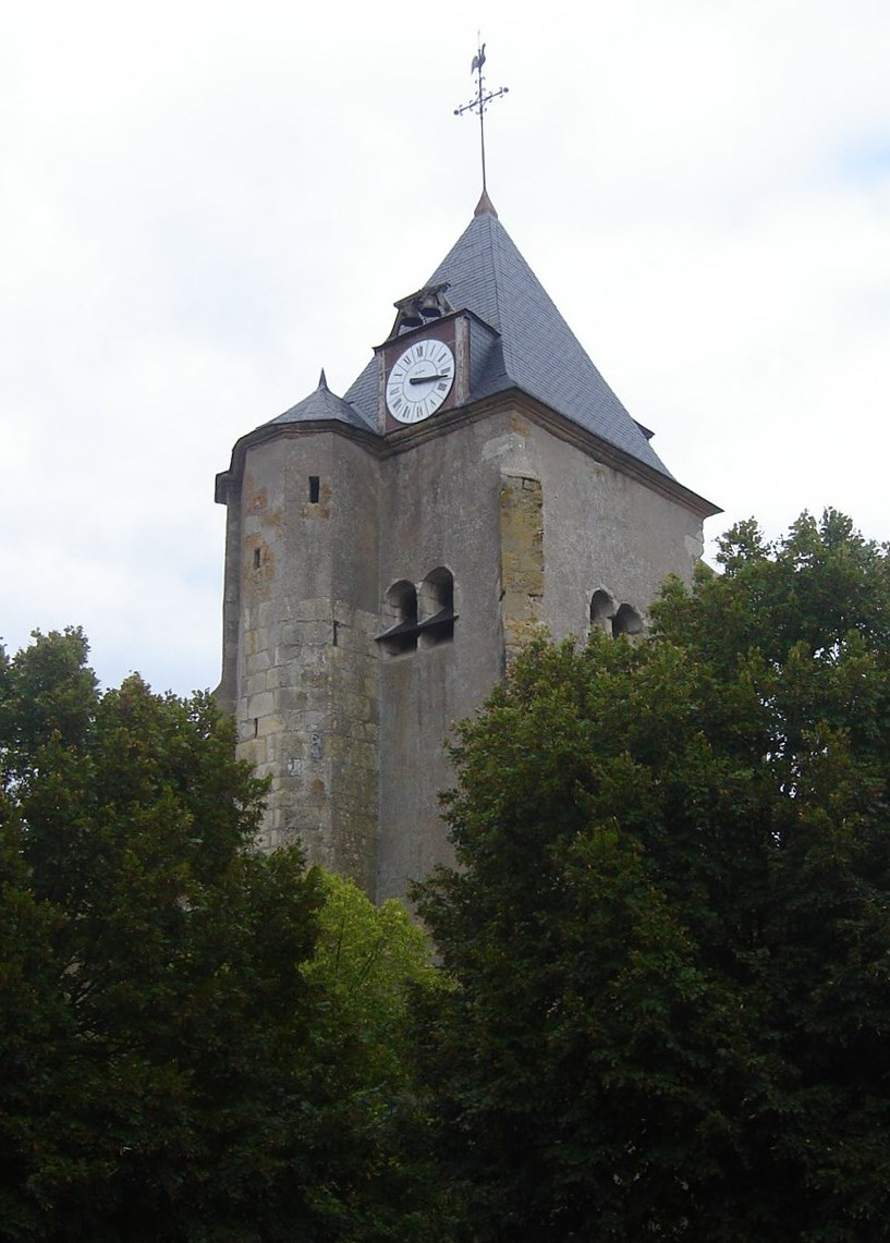 Église Saint-Jean-Baptiste, La Maison-Dieu, Nièvre, France.